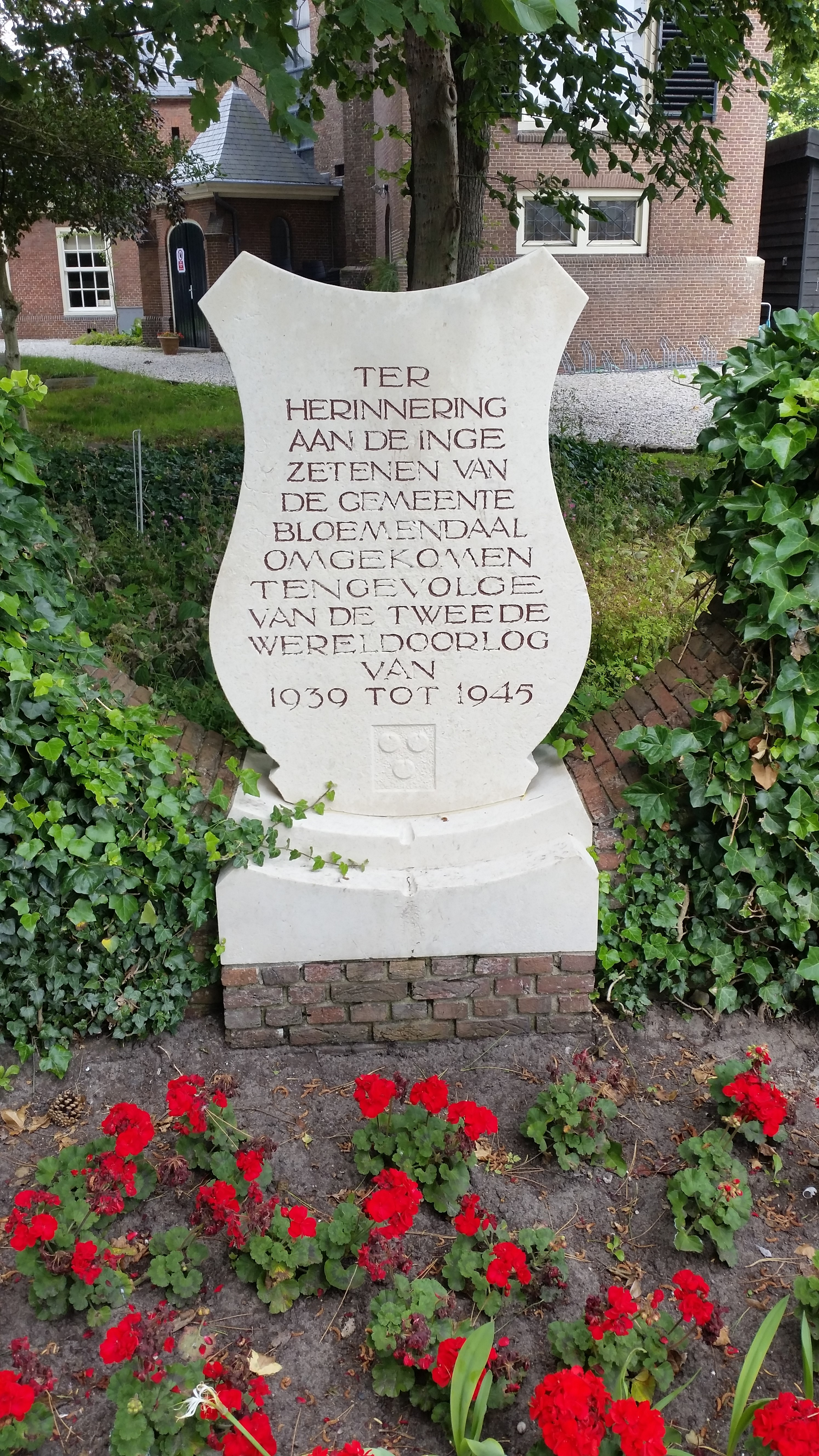 Impressie Bevrijdingsmonument Bloemendaal (juli 2020)